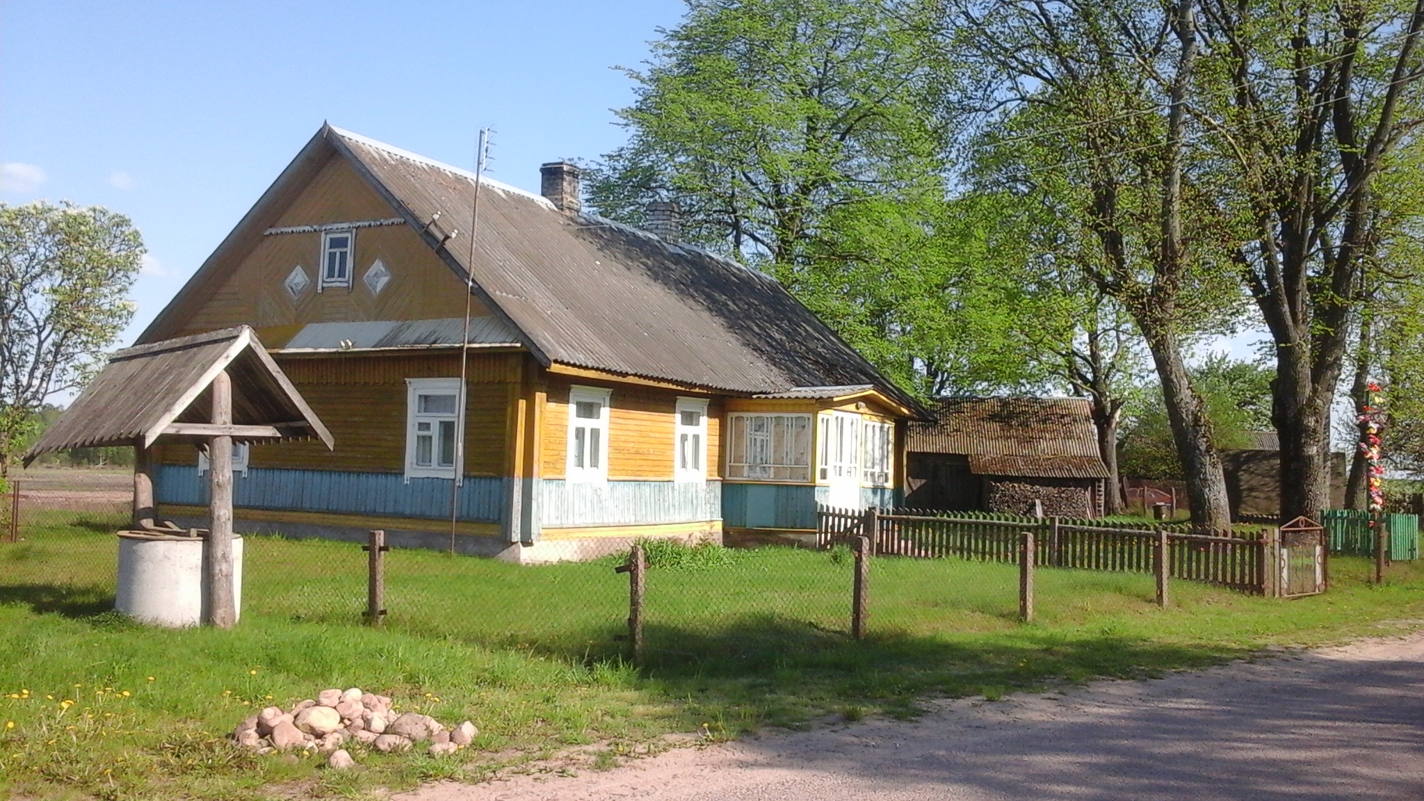 Сельский дом в деревне Гиричи